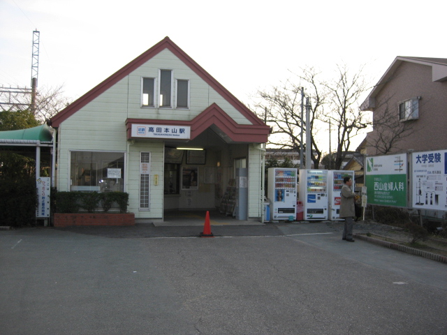 近鉄・高田本山駅